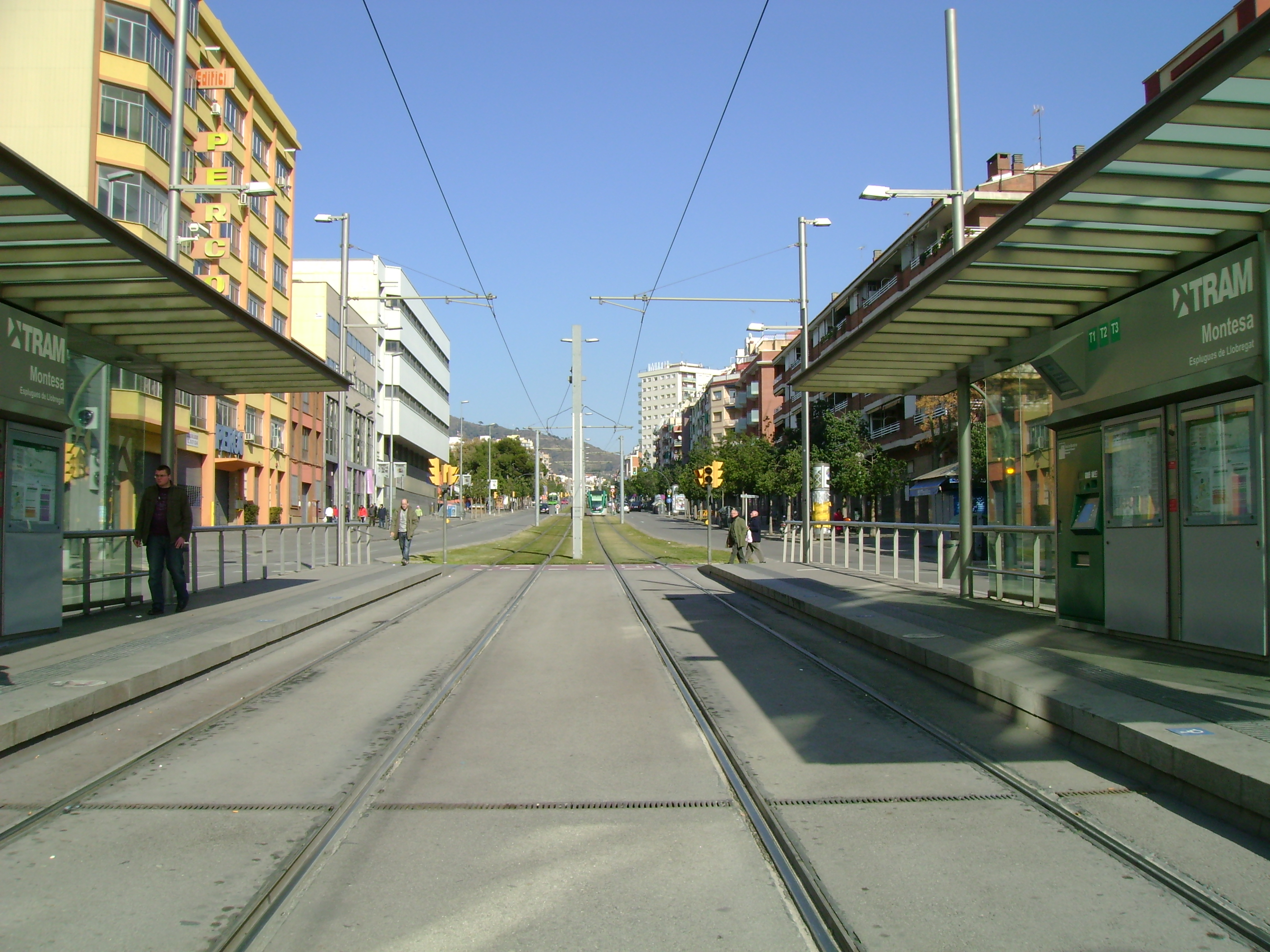 Foto capturada per la meva càmara a l'estació de Montesa (Trambaix).